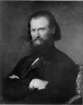 Der ehemalige Leiter des germanischen Nationalmuseums Nürnberg August Ottmar Essenwein (1831-1892)